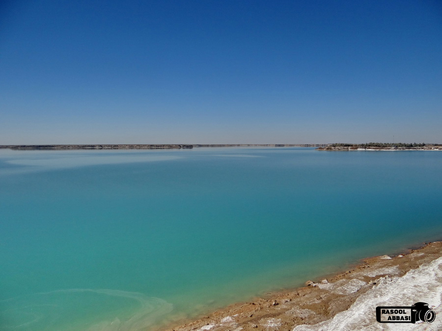 چاه نیمه تصویر شماره 1